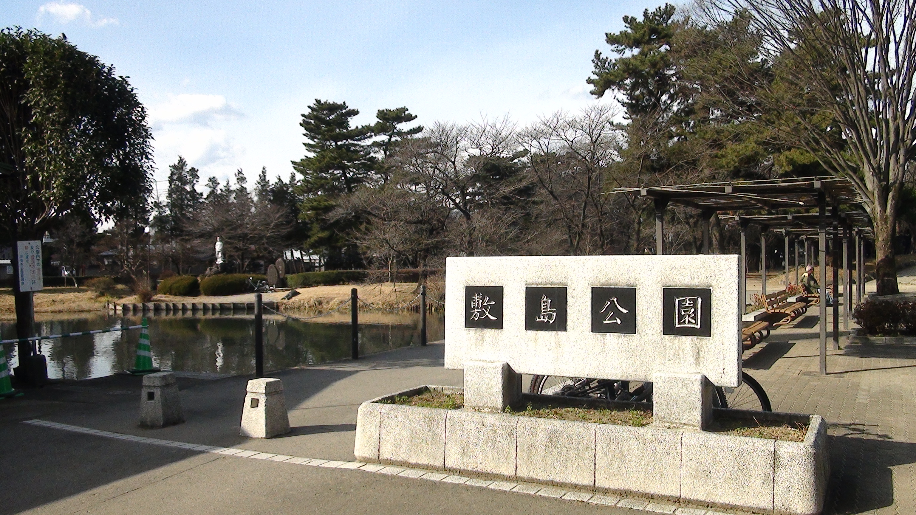 前橋敷島公園